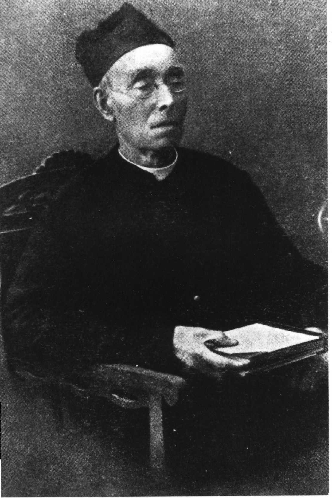 sconosciuto 1900 ca. fotografia pubblico dominio